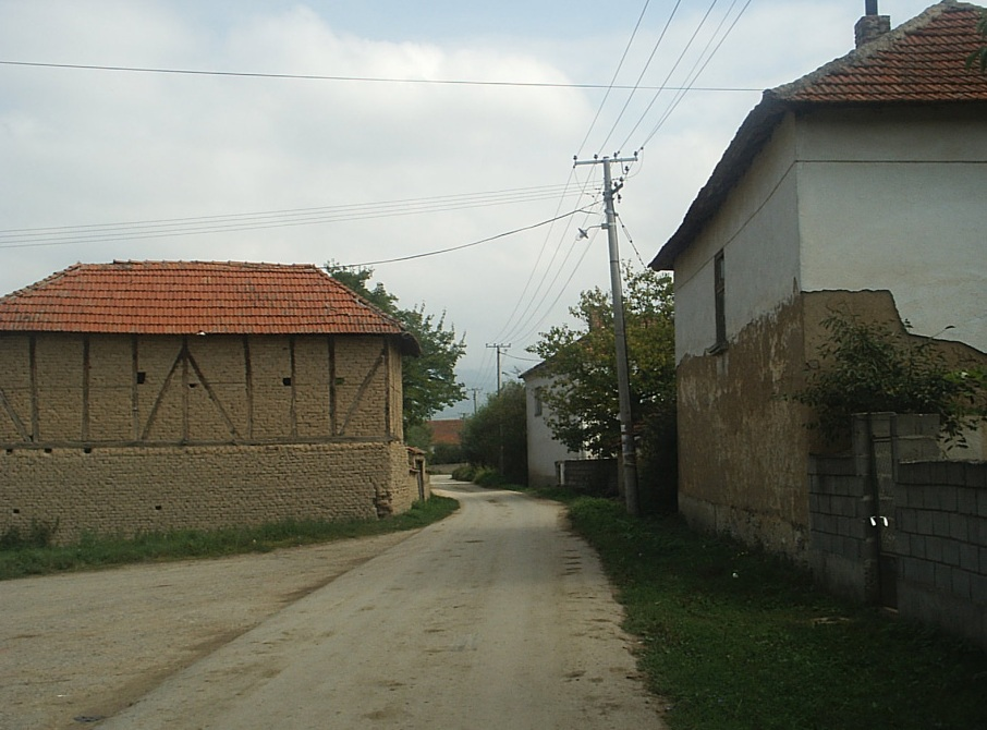 Биновце.